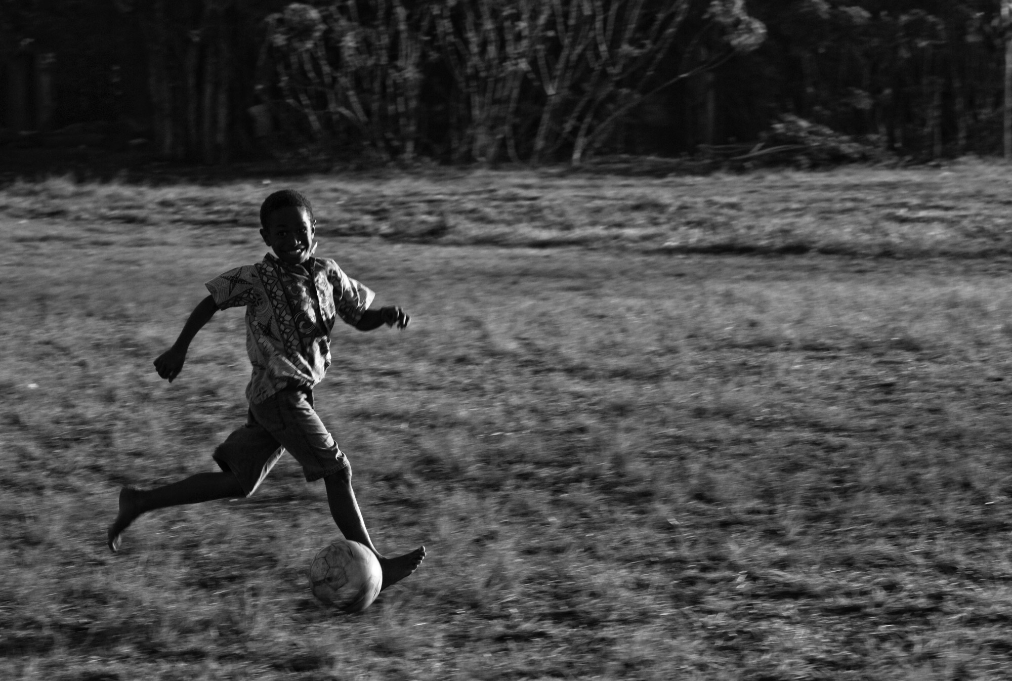 Running Boy